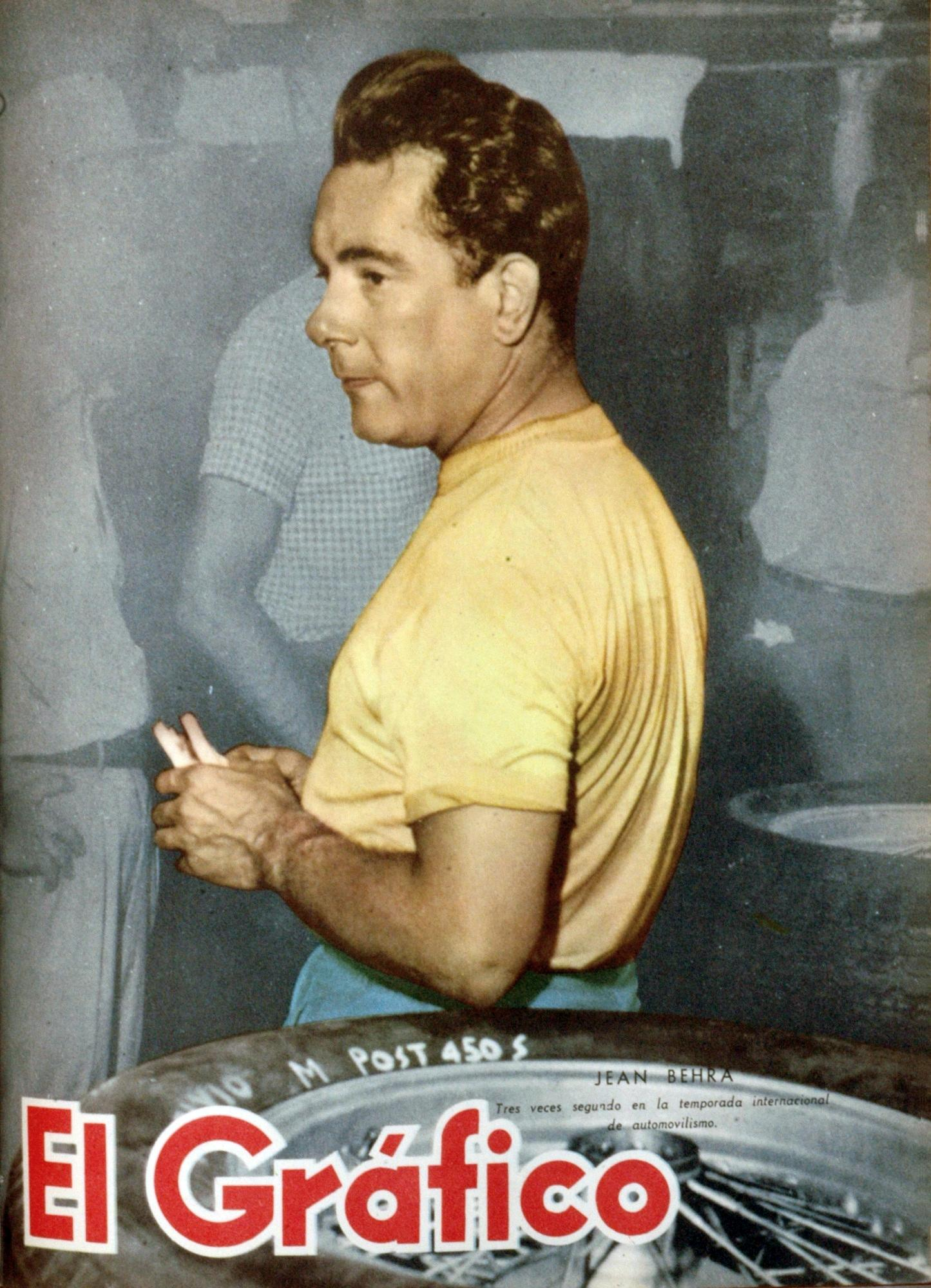 El Grafico del 15 de Febrero de 1957. Edicion 1953